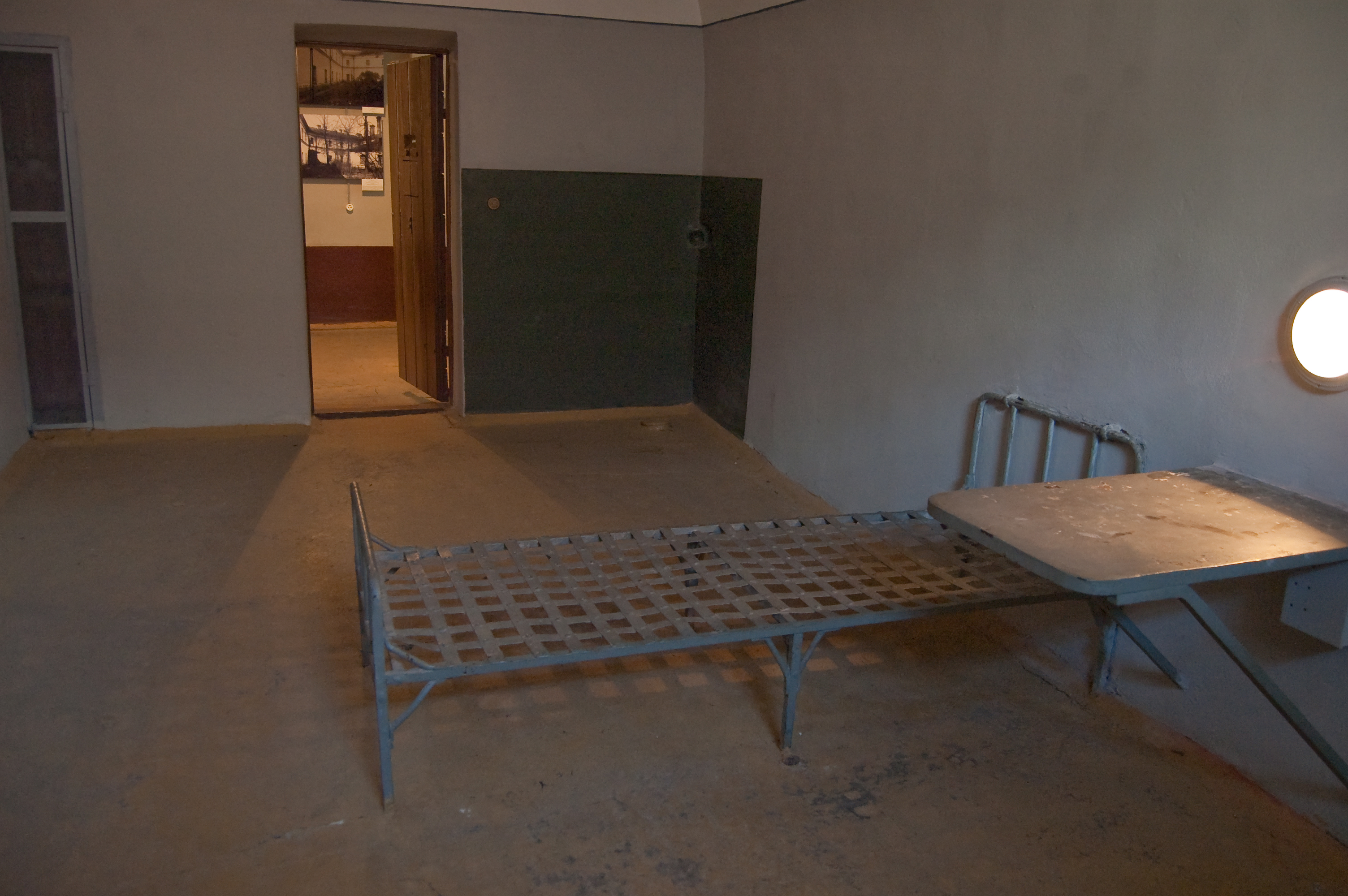 Тюремная камера